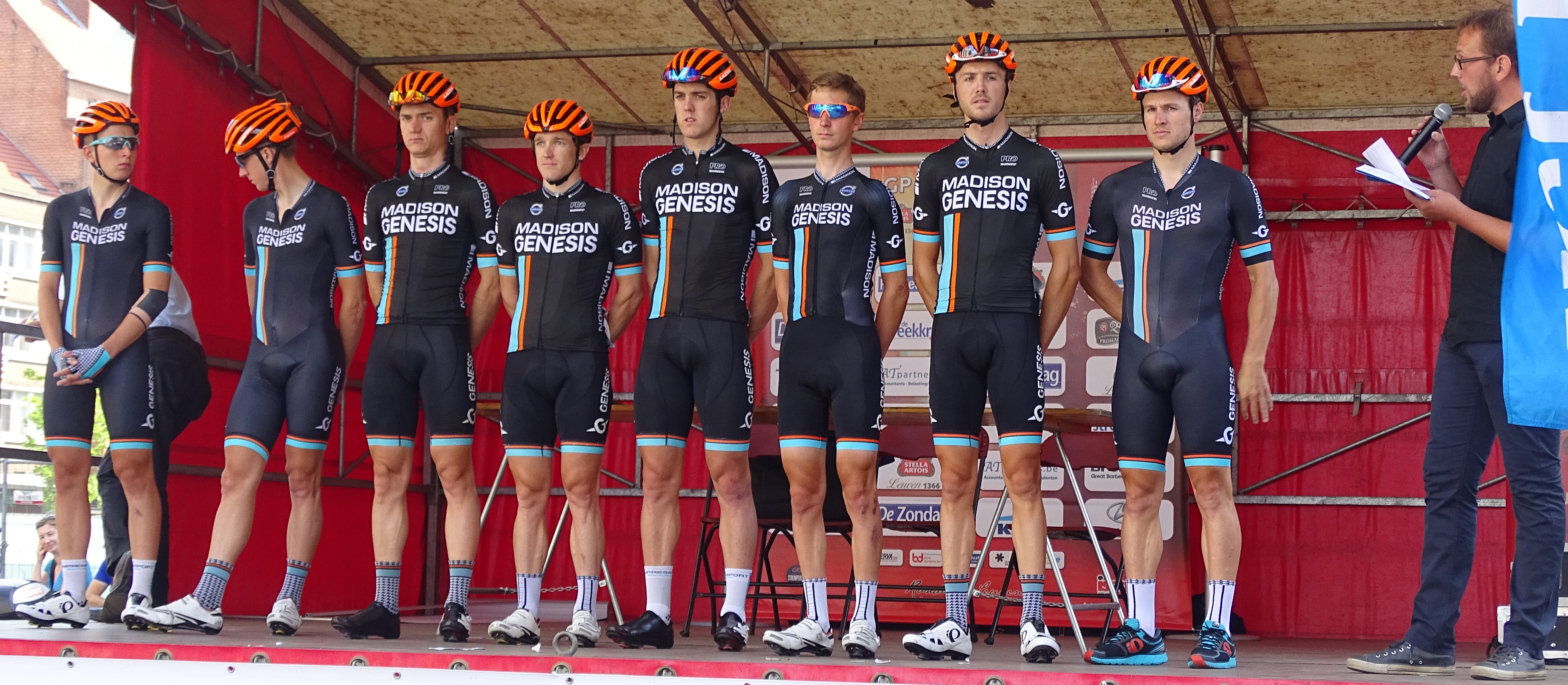 Reportage réalisé le dimanche 23 août à l'occasion du départ et de l'arrivée du Grand Prix Jef Scherens 2015 à Louvain, Belgique.